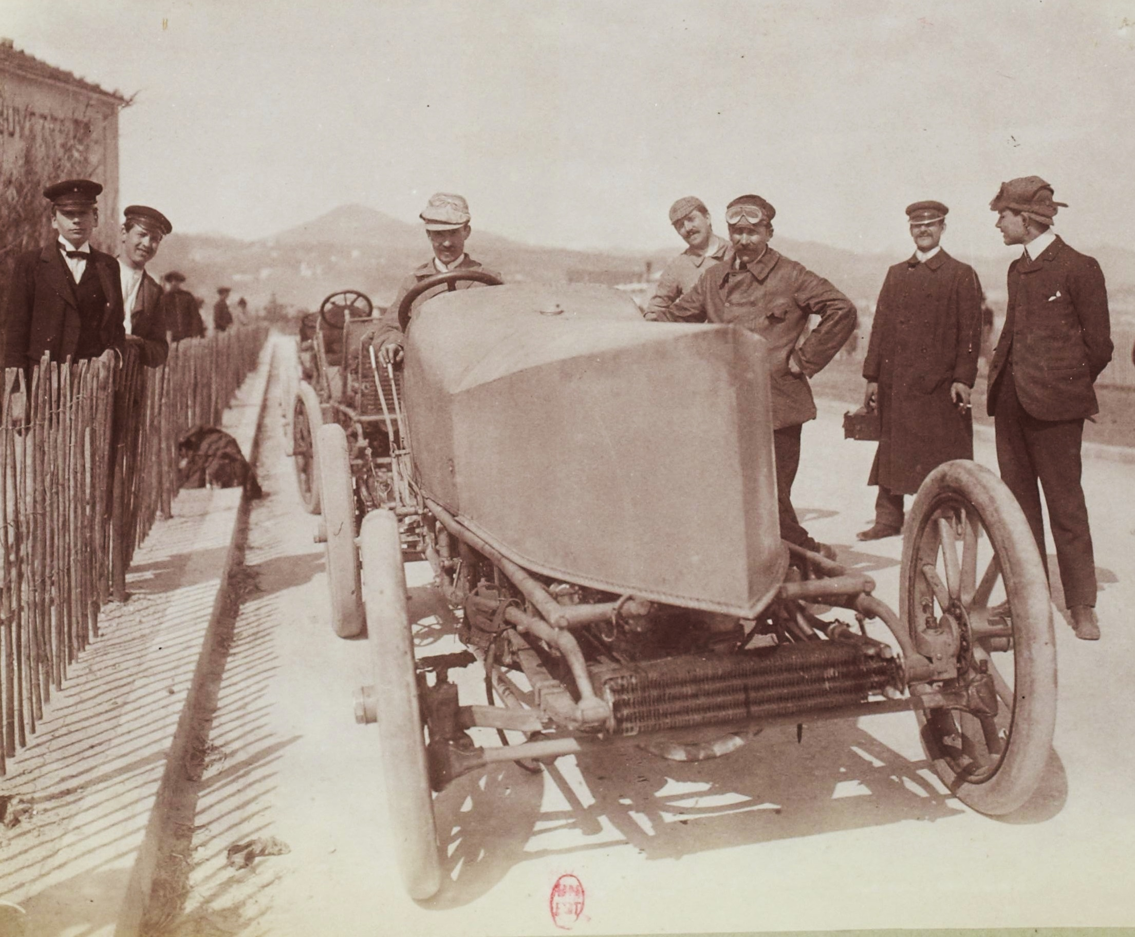 [Collection Jules Beau. Photographie sportive] : T. 25. Année 1904 / Jules Beau : F. 23. [Mille, Coupes de Rothschild, Nice, 31 mars 1904]